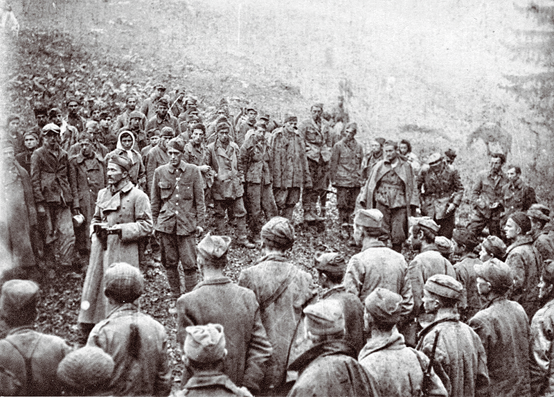 Srpskohrvatski / српскохрватски: Komandant 1. proleterske brigade Danilo Lekić govori borcima uoči proboja na Sutjesci, juna 1943.